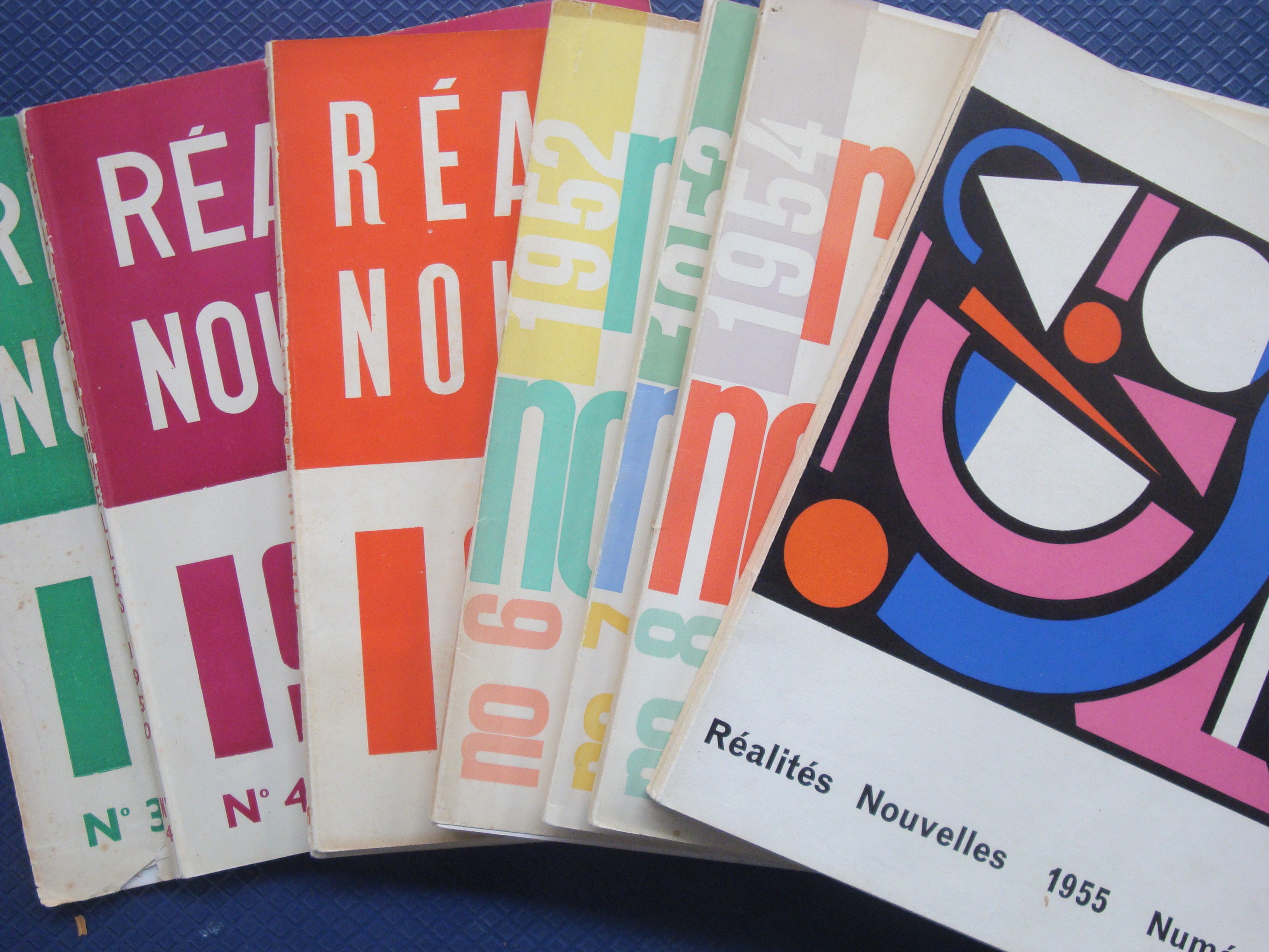 Les Cahiers des Réalités Nouvelles des années 50. Archives Réalités Nouvelles/IMEC.